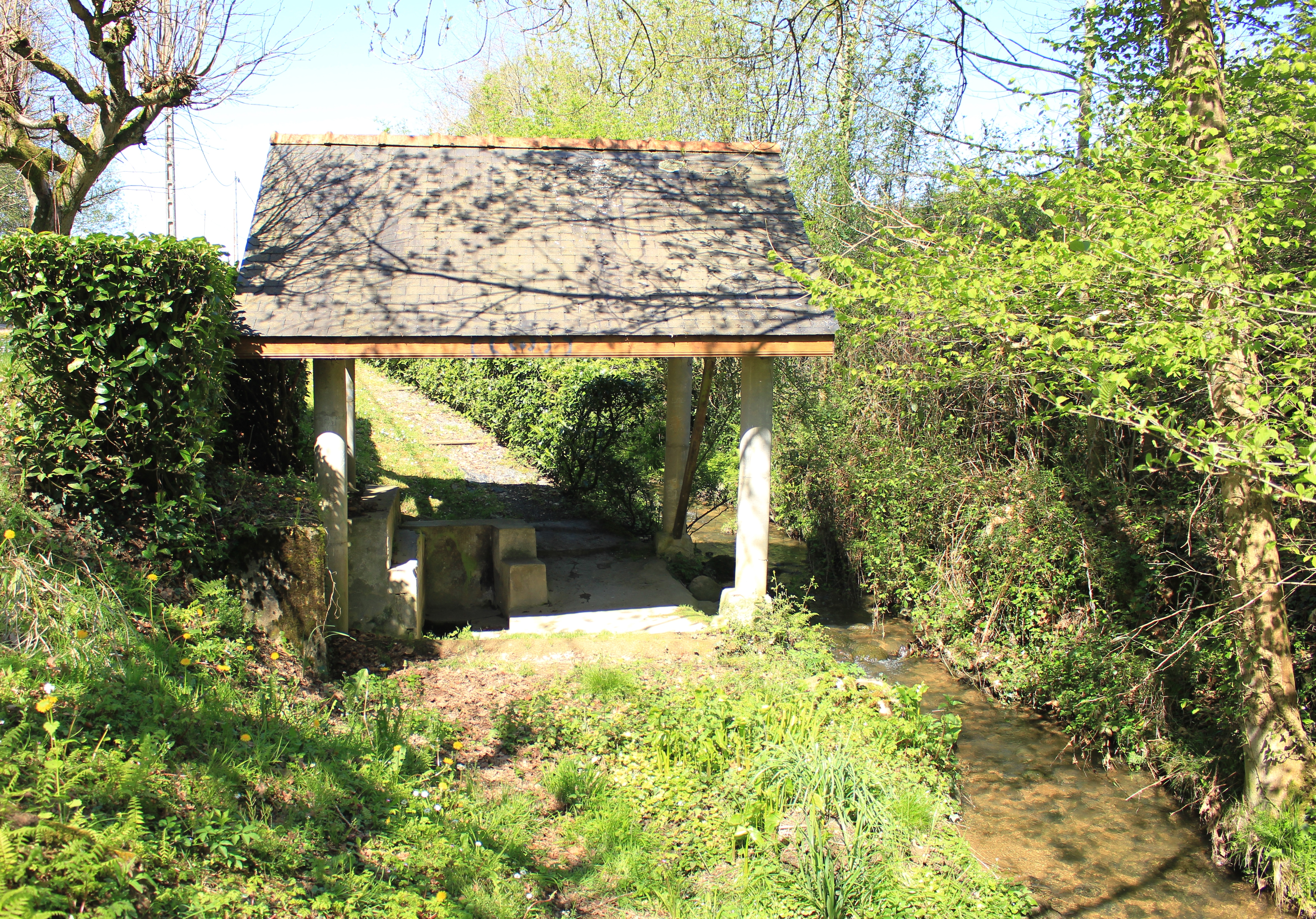 Lavoir de Lamarque-Pontacq (Hautes-Pyrénées)